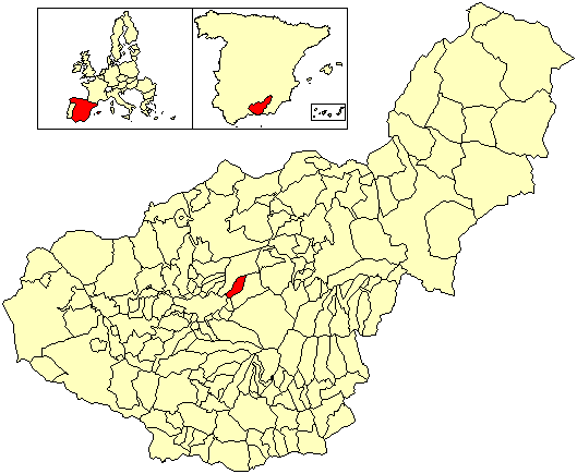 Situación del término municipal de Beas de Granada respecto a la provincia de Granada, en España.